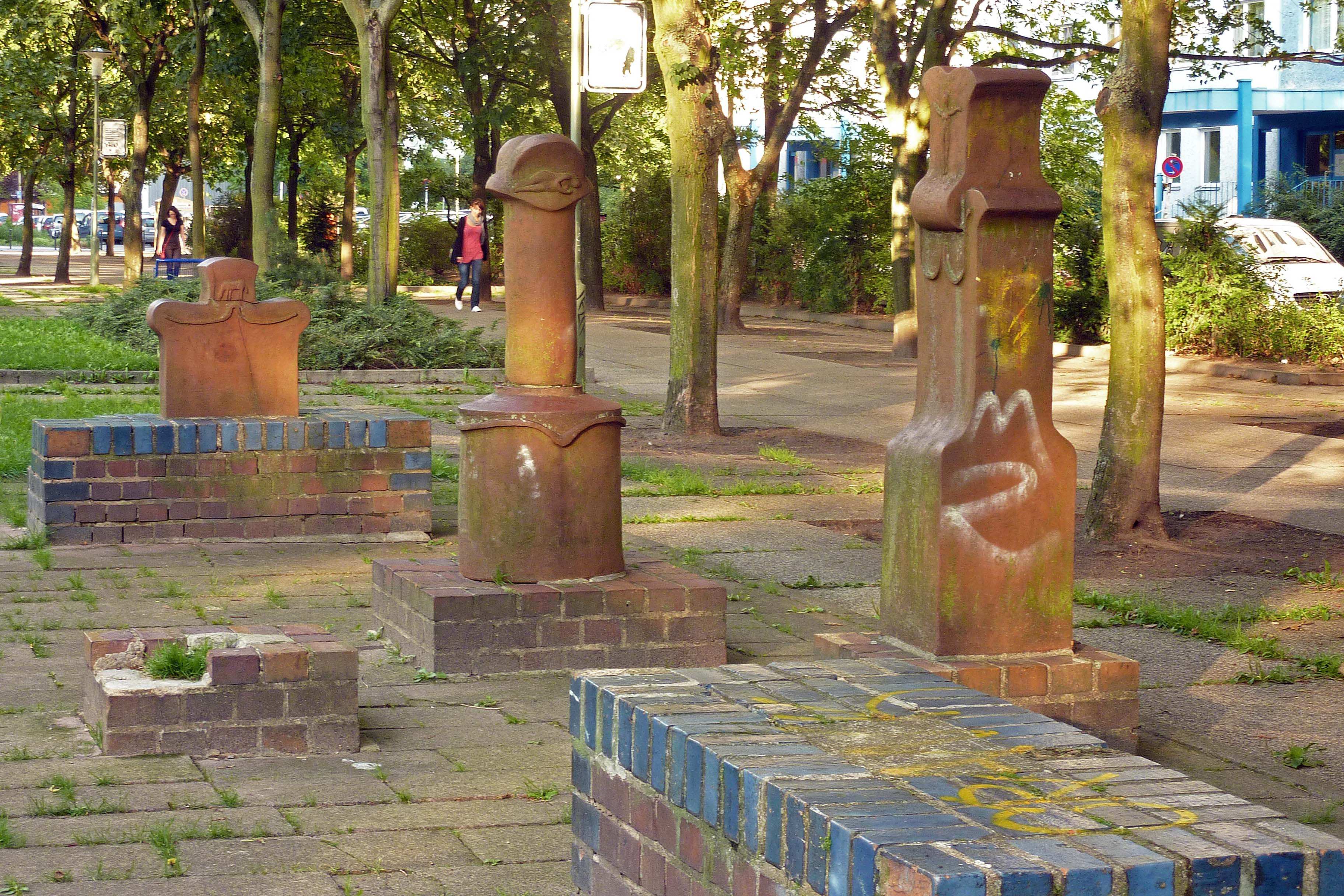 Keramikensemble 'Märkische Wegkreuze' von Christiane Wartenberg aus dem Jahr 1982, entlang der Dathepromenade in Berlin-Friedrichsfelde. Teilansicht mittlere Gruppe.